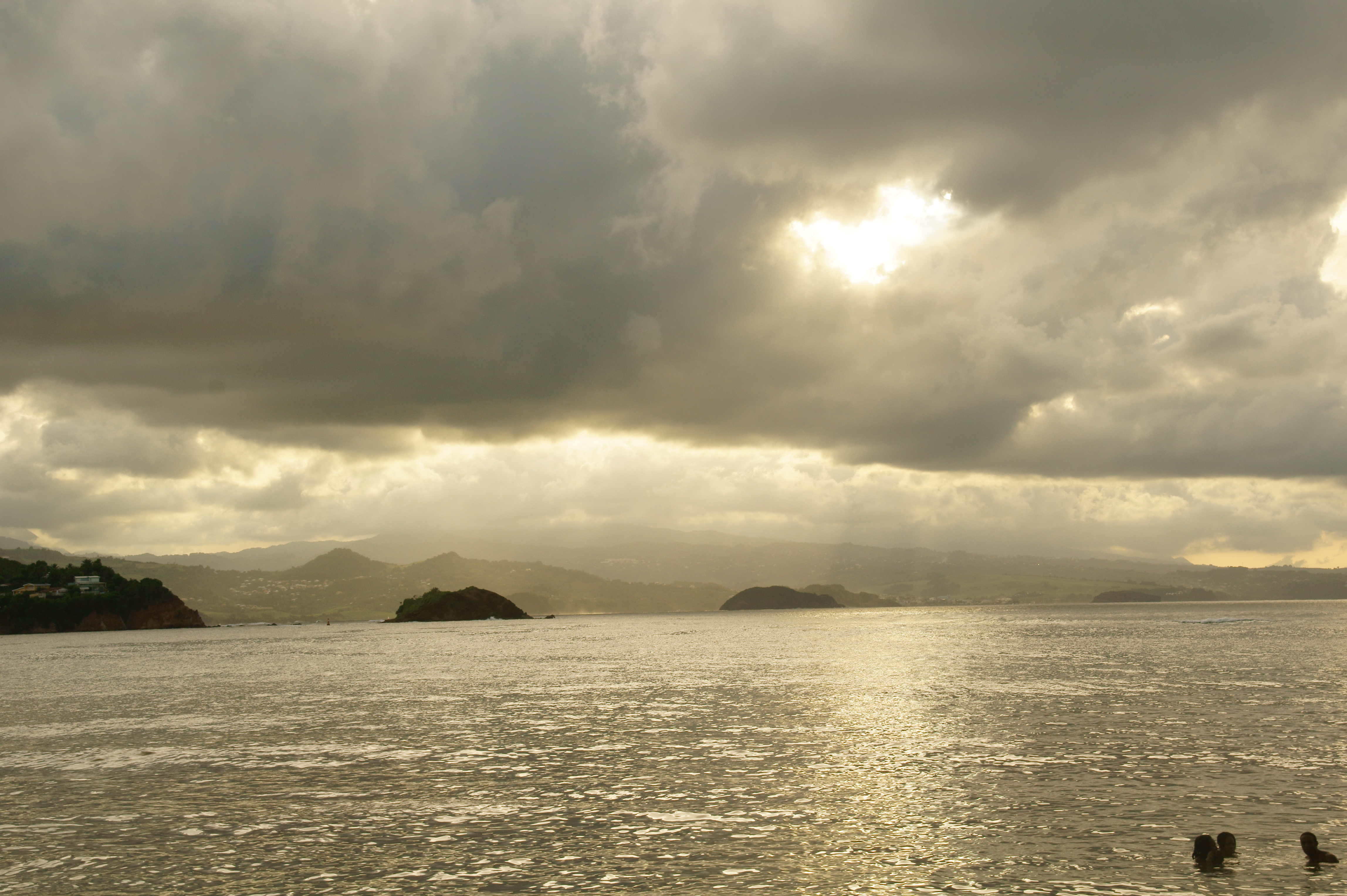 Vue sur la plage de Tartane, lieu-dit de La Trinité, en Martinique